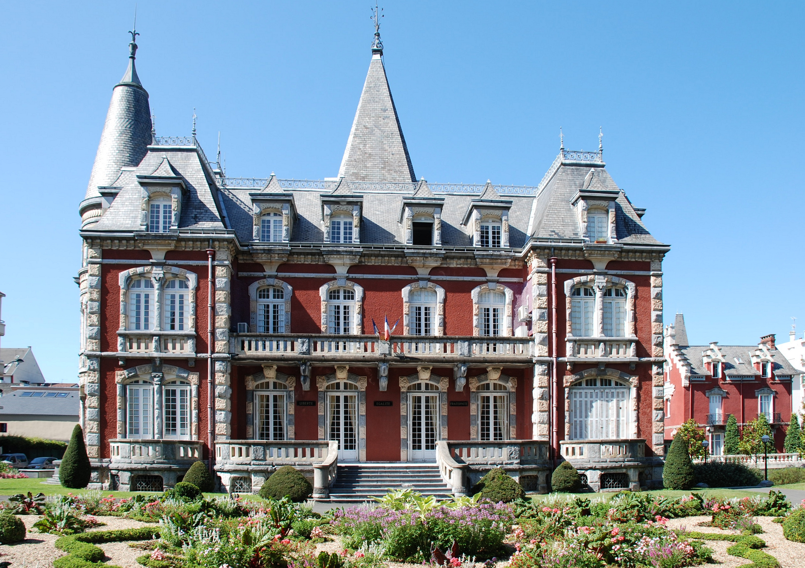 Mairie de Lourdes